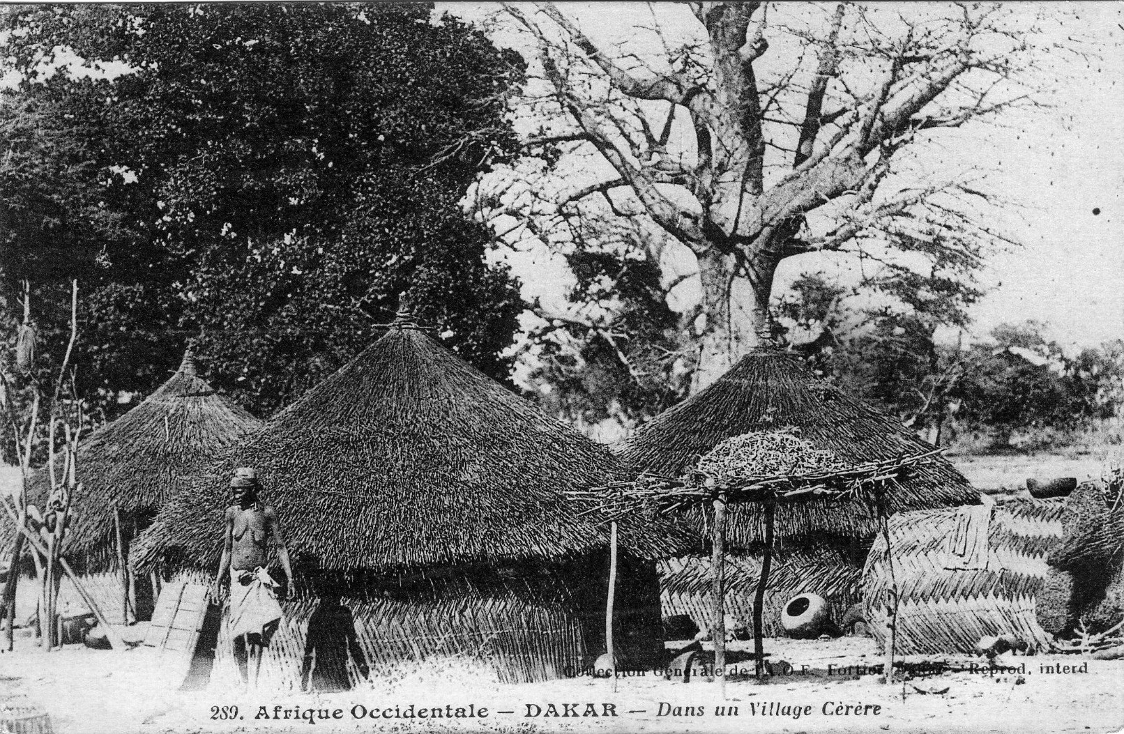 "Afrique Occidentale - Dans un village Cérère"